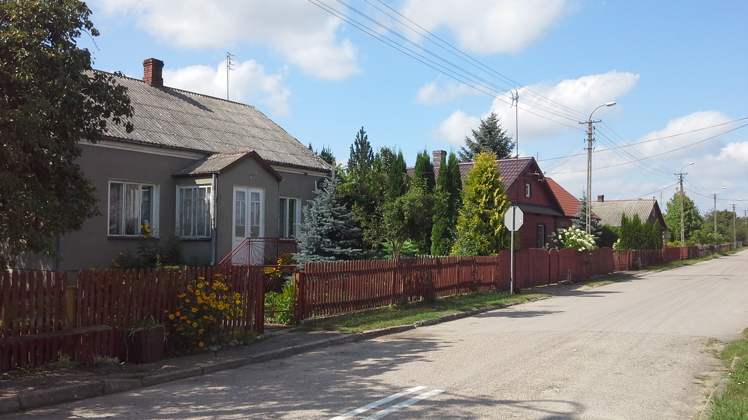 Centrum wsi Dasze